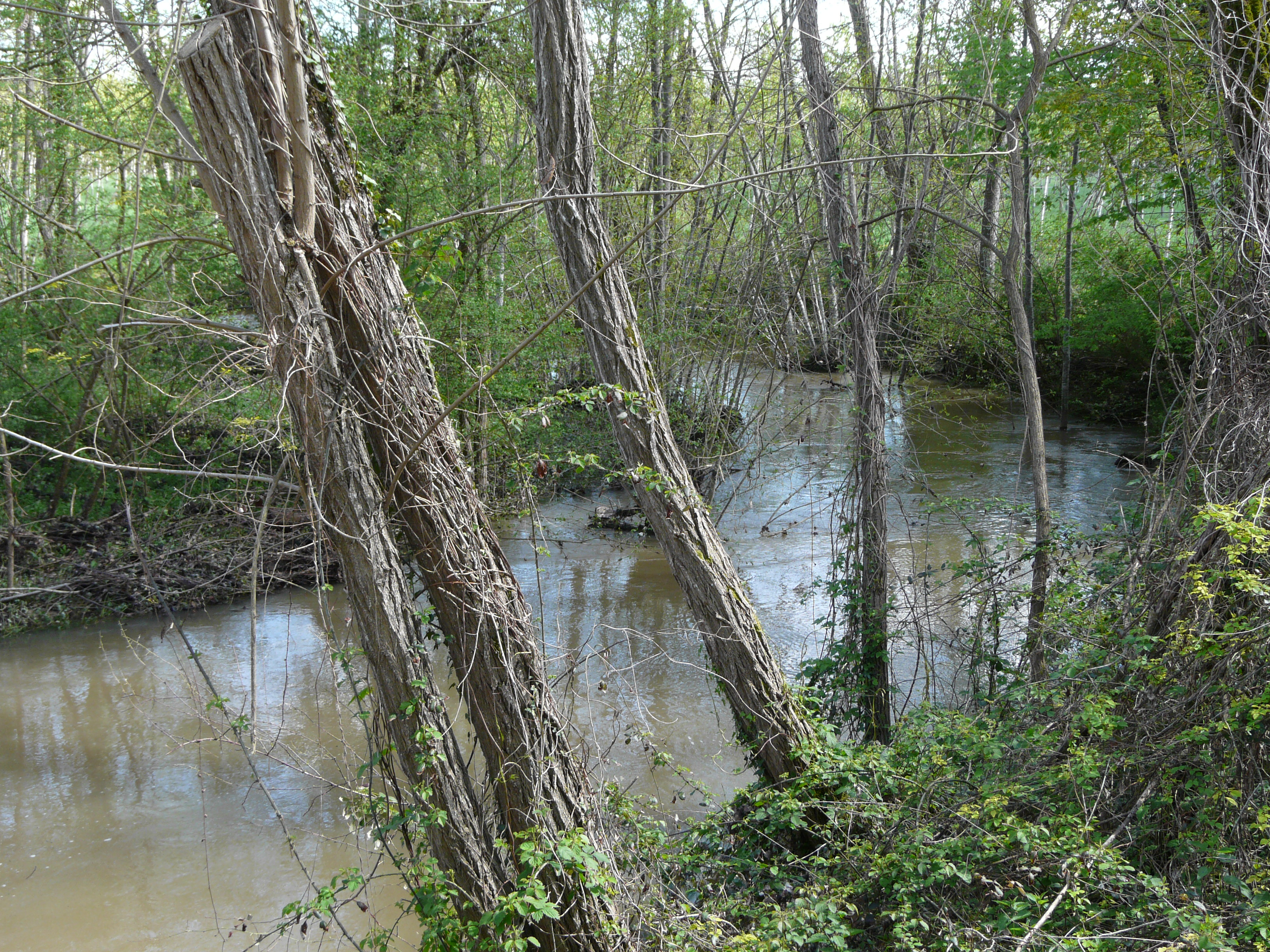 Le Grolet en crue, en aval de la route départementale 3, Dordogne, France. Il marque la limite entre Saint-Martin-l'Astier (à gauche) et Saint-Laurent-des-Hommes (à droite).